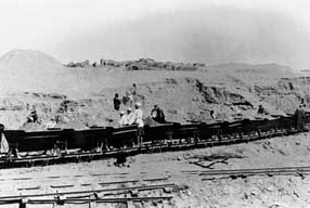 Feldbahn bei Karanis im Fayoum-Gebiet von Ägypten